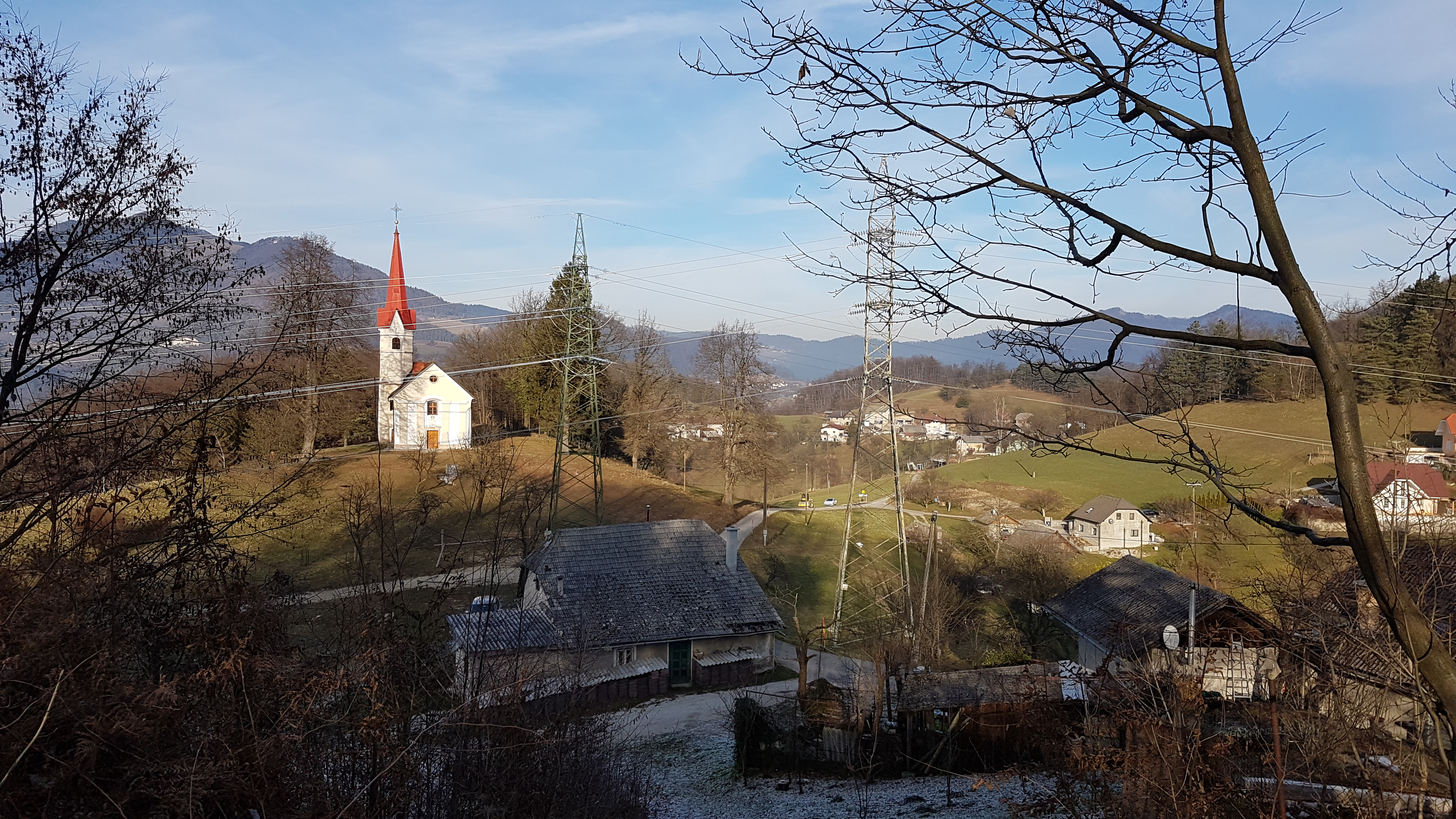 Ravenska vas, slikana s hriba proti Hrastelovi skali, na hribu je cerkev sv. Urha